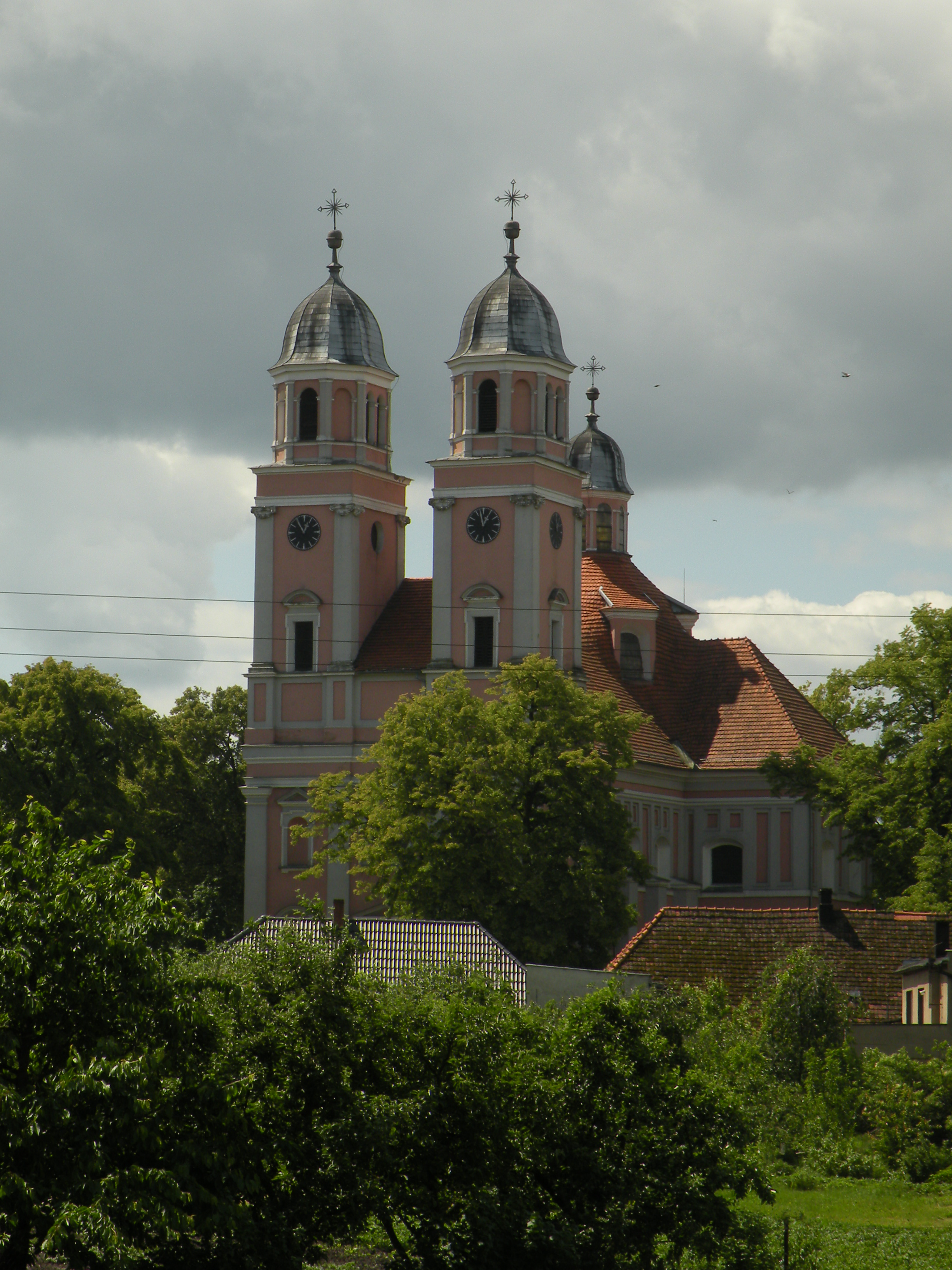 Kościół pobernardyński w Sierakowie (Wielkopolska)